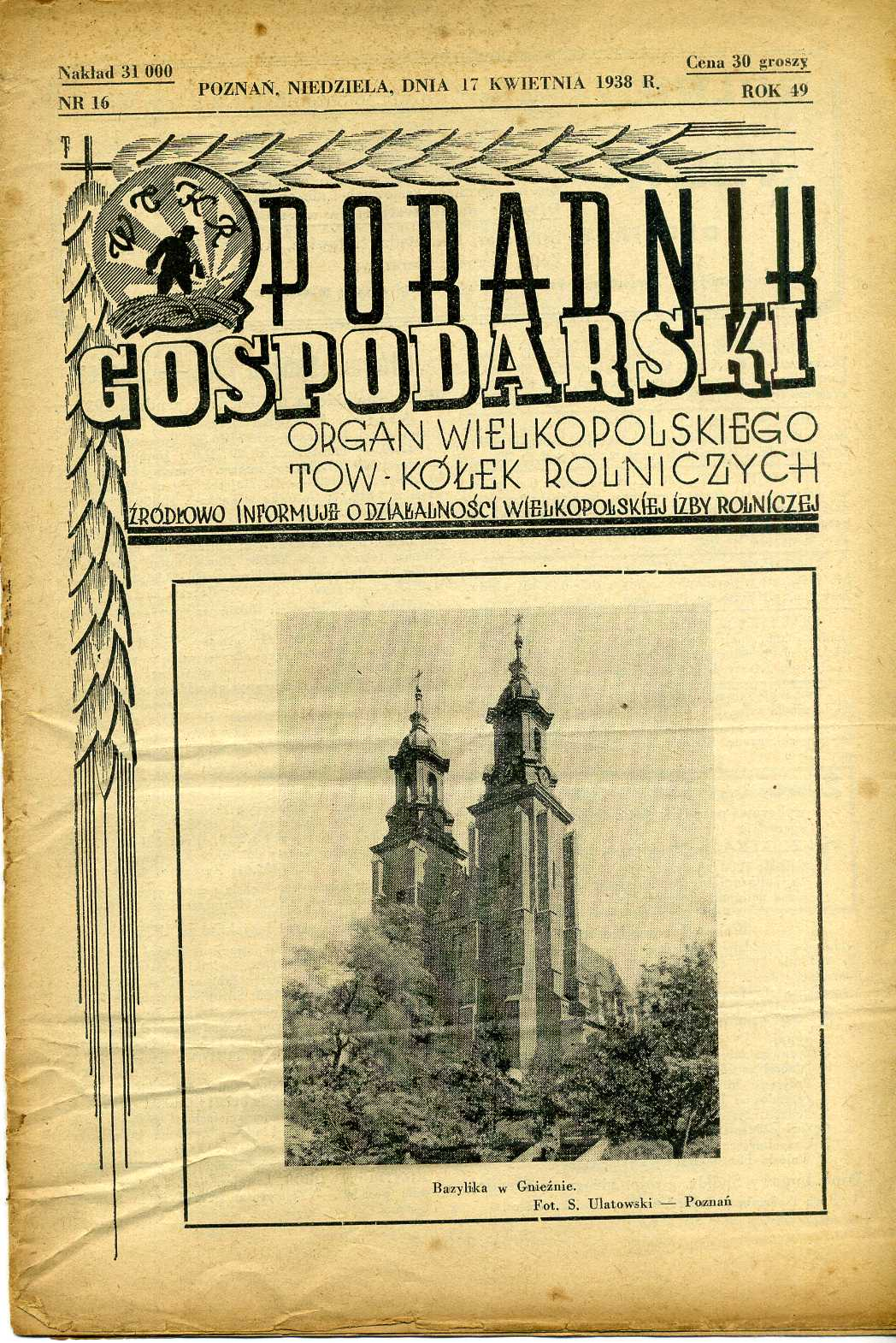 Okładka Poradnika Gospodarczego z 17 kwietnia 1938